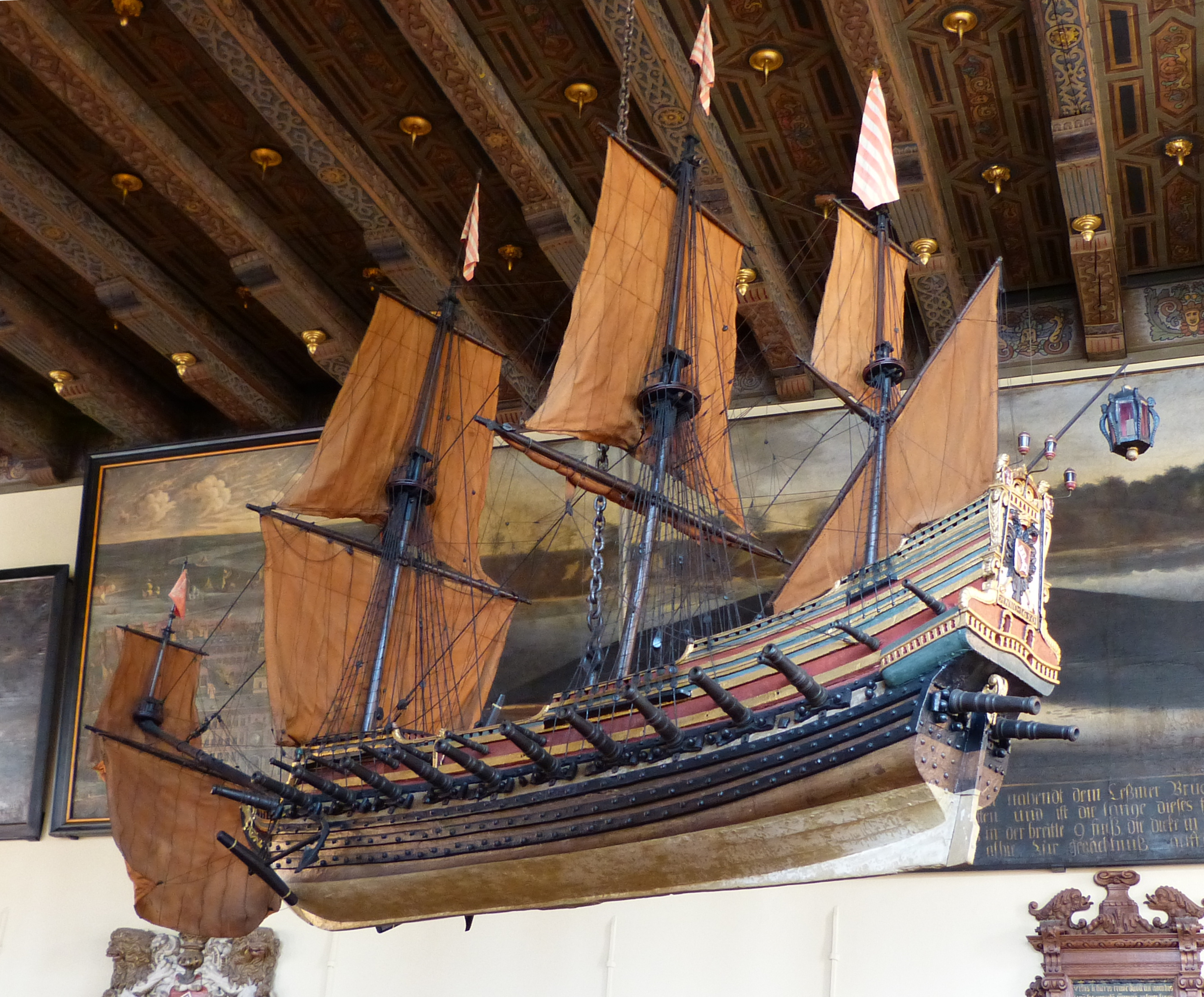 Schiffsmodell in der Oberen Halle des Rathauses in Bremen.Das Rathaus ist ein geschütztes Kulturdenkmal in der Freien Hansestadt Bremen, mit der Nr. 0066,T001 beim Landesamt für Denkmalpflege registriert.